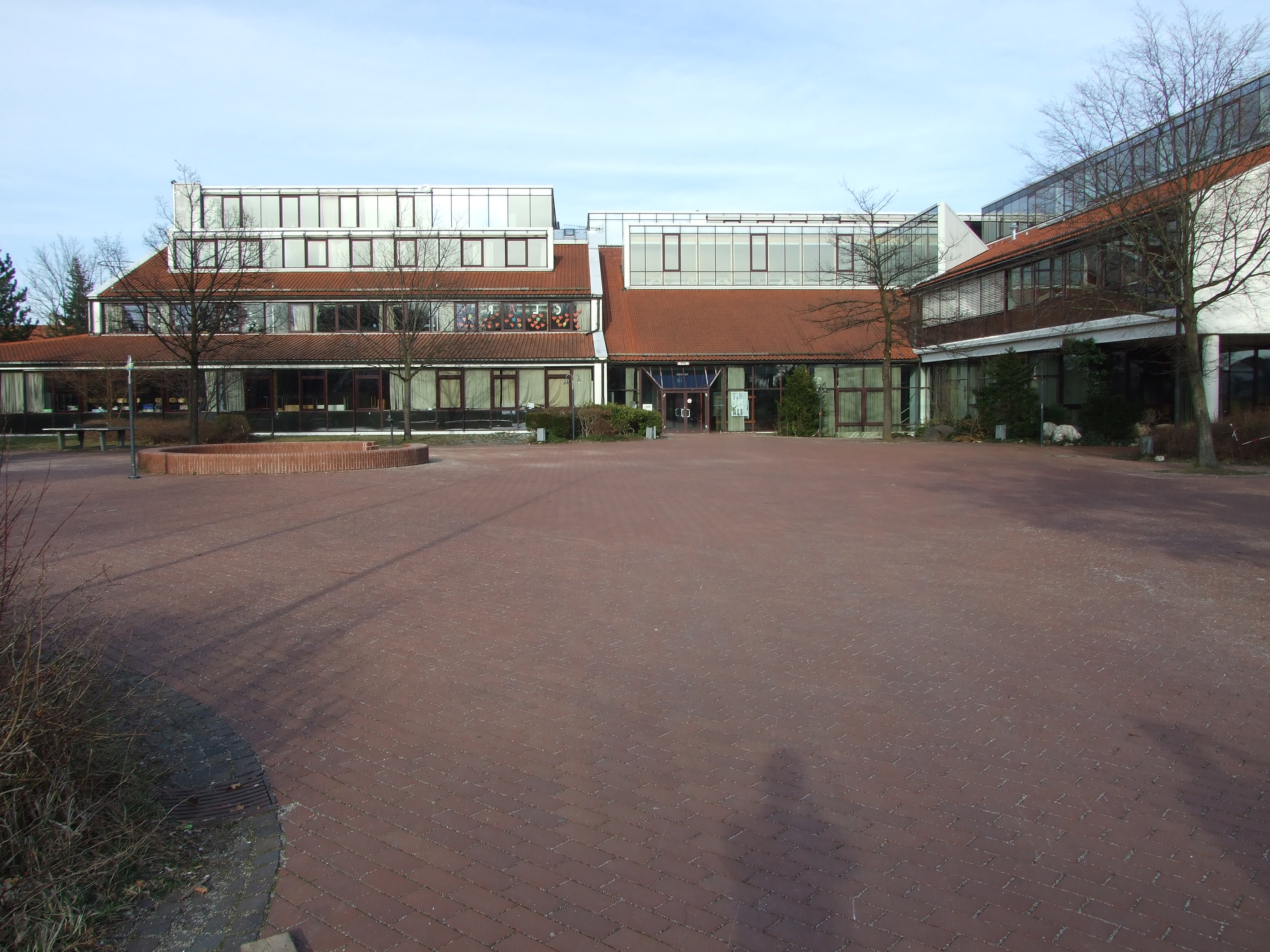 Gymnasium of Kirchheim bei München